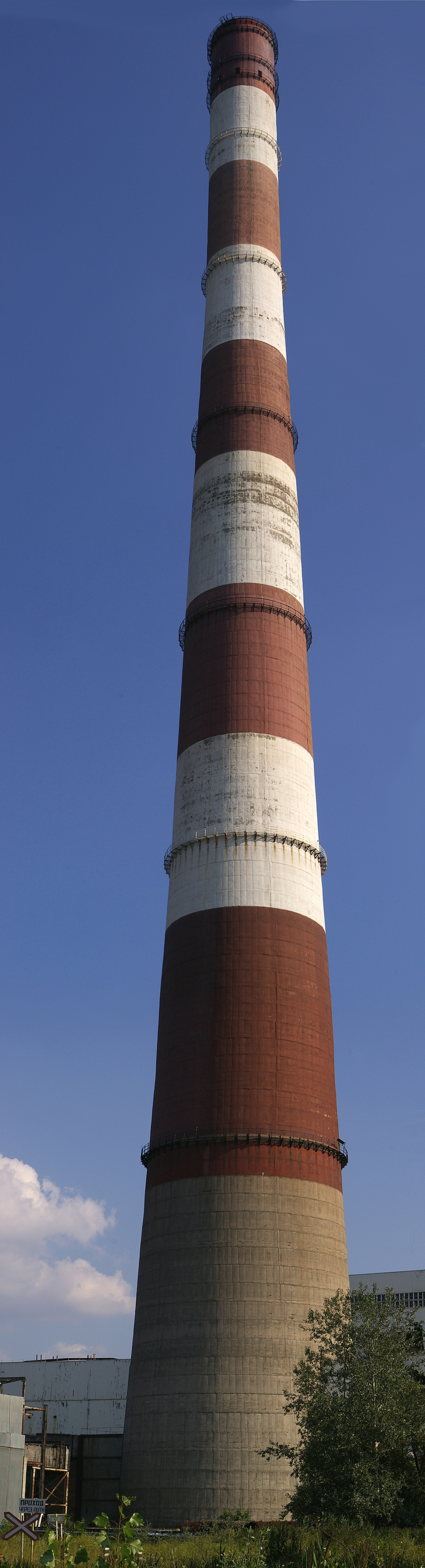 Песочин (с. Подворки). Труба харьковской ТЭЦ-5. Высота 330 метров.